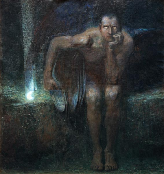 Luzifer